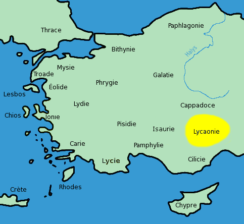 La Lycaonie